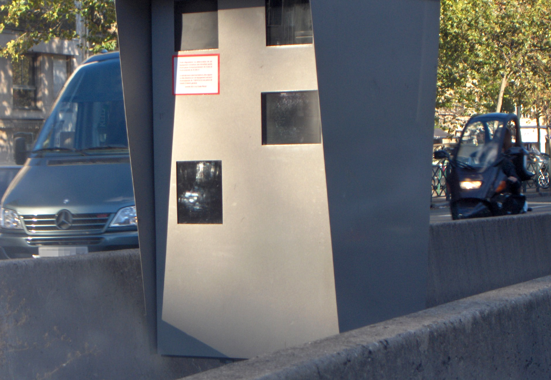 Radar automatique, face active ©éréales Kille® ? 27 déc 2004 à 10:24 (CET)